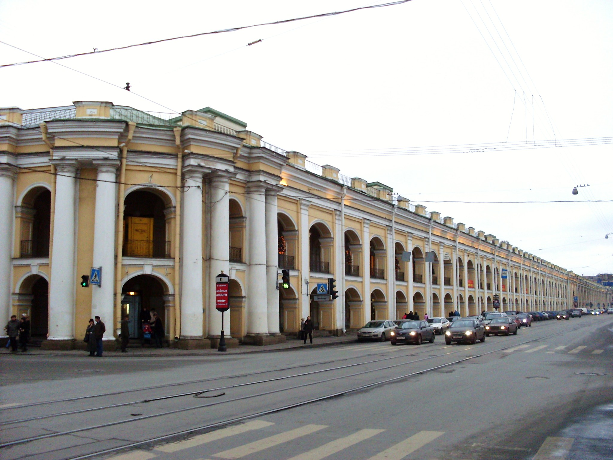 Гостиный двор, Санкт-Петербург